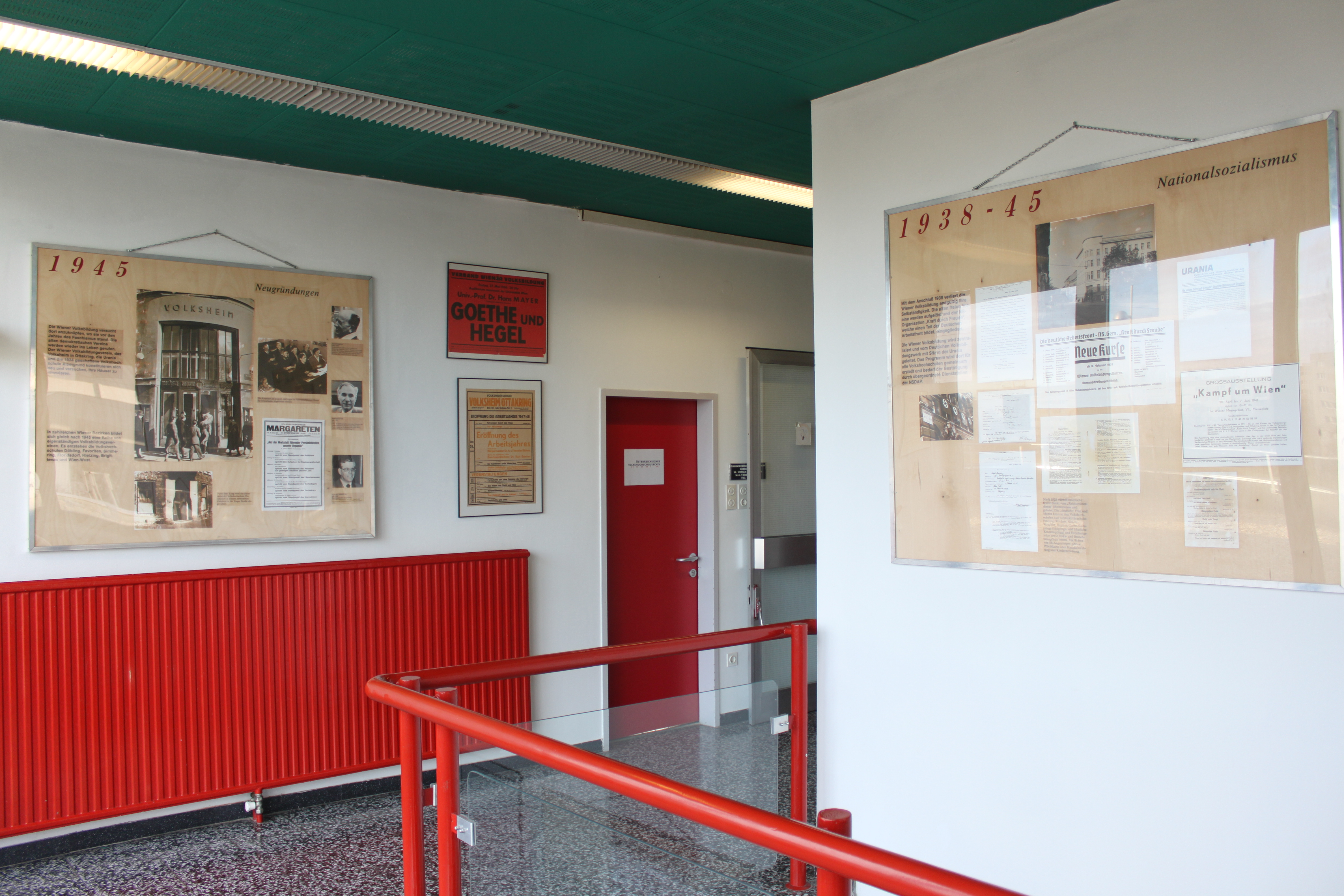 Stiegenhaus mit Ausstellung